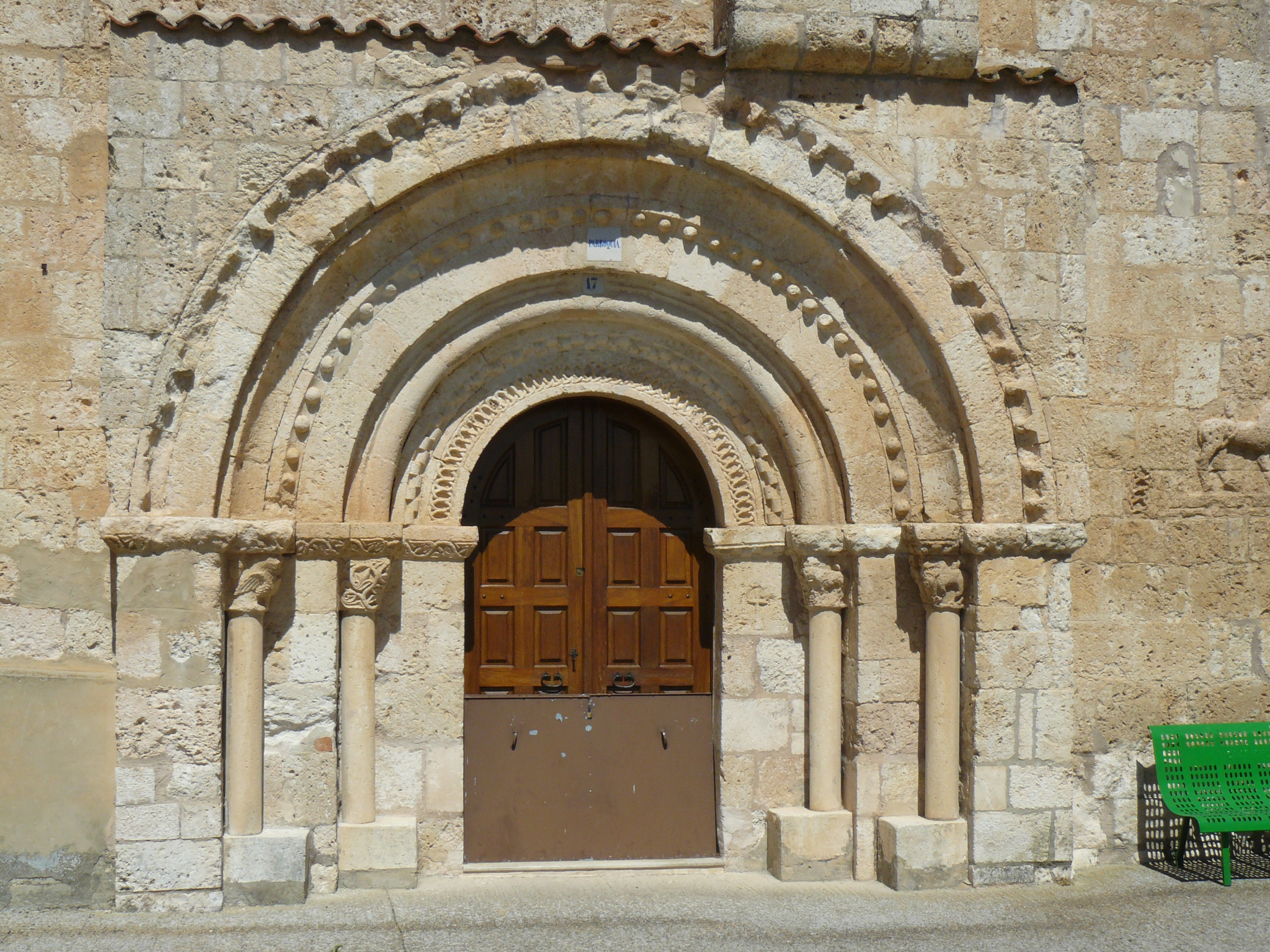 Cabañes de Esgueva, Burgos.